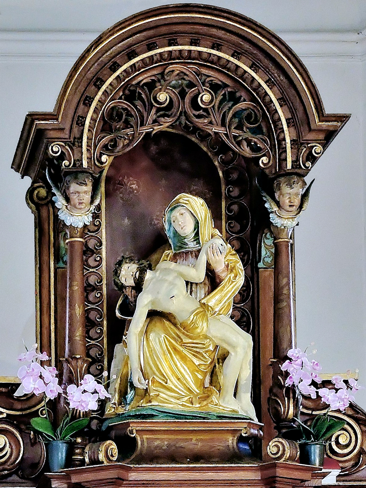 Pietà du Retable de la chapelle Notre-Dame de Thierhurst. Heiteren. Haut-Rhin